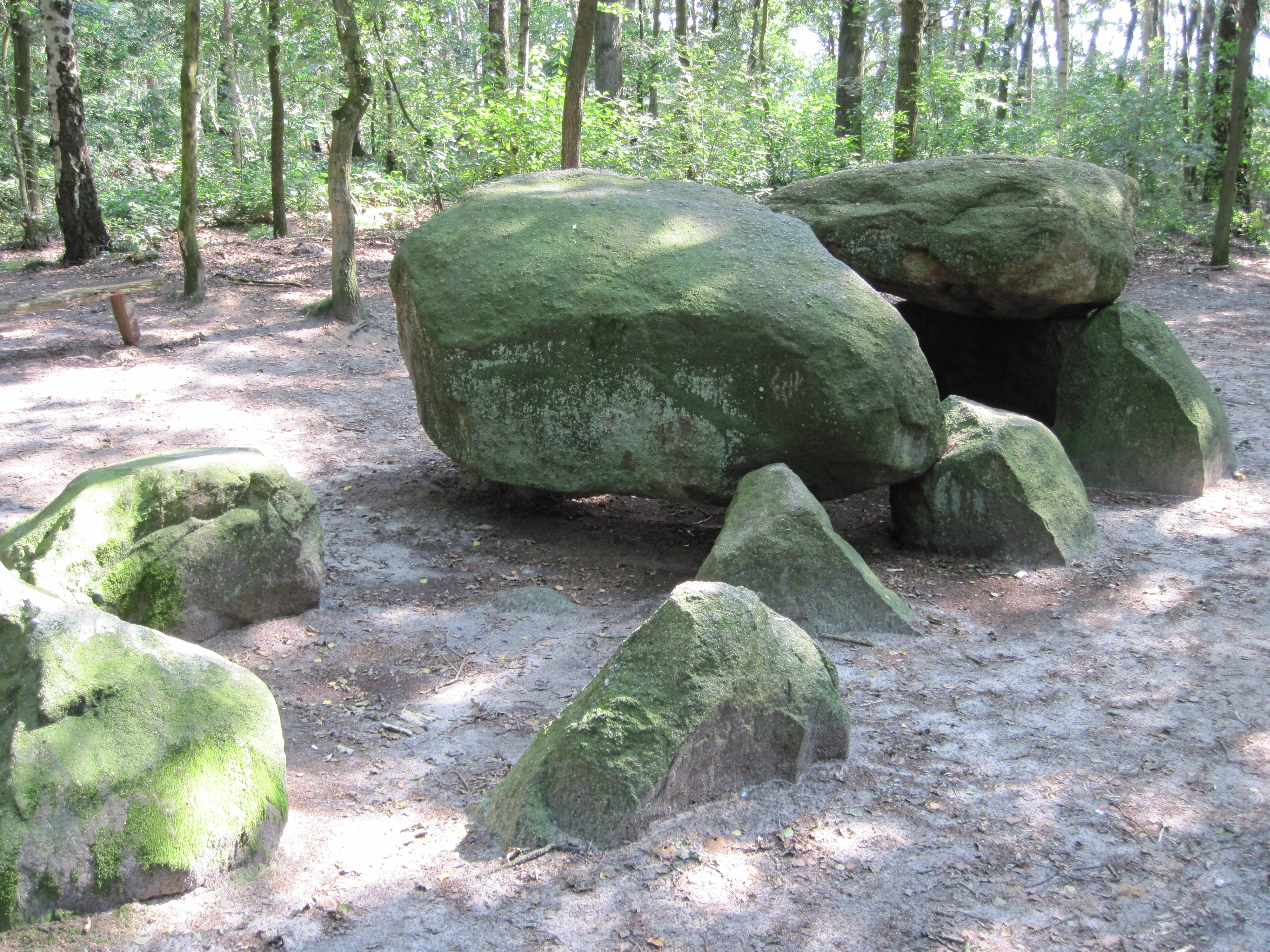 Großsteingrab (Hünensteine) in Lindern (Oldenburg), Neuenkämpen